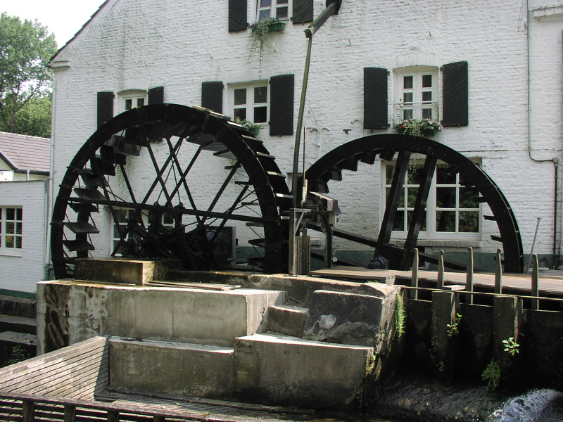 Die Mühlrather Mühle in Schwalmtal, die älteste Wassermühle am Niederrhein anno 1447